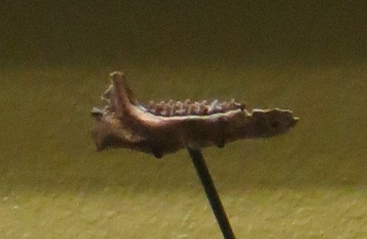 Fossil of Pseudamphimeryx- Took the picture at Natural History Museum, Basel